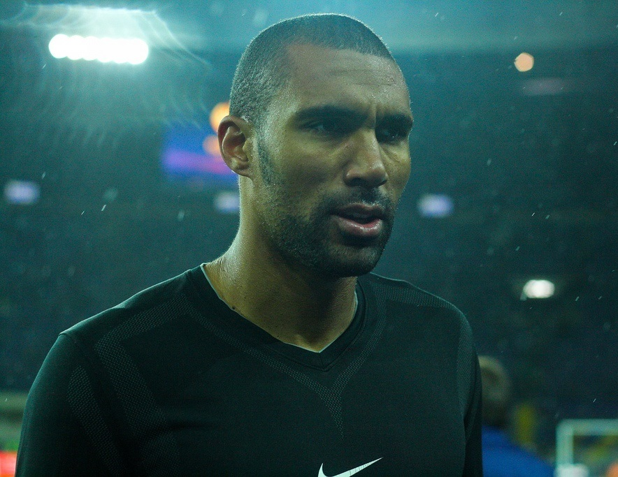 Орландо Энгелаар Orlando Engelaar